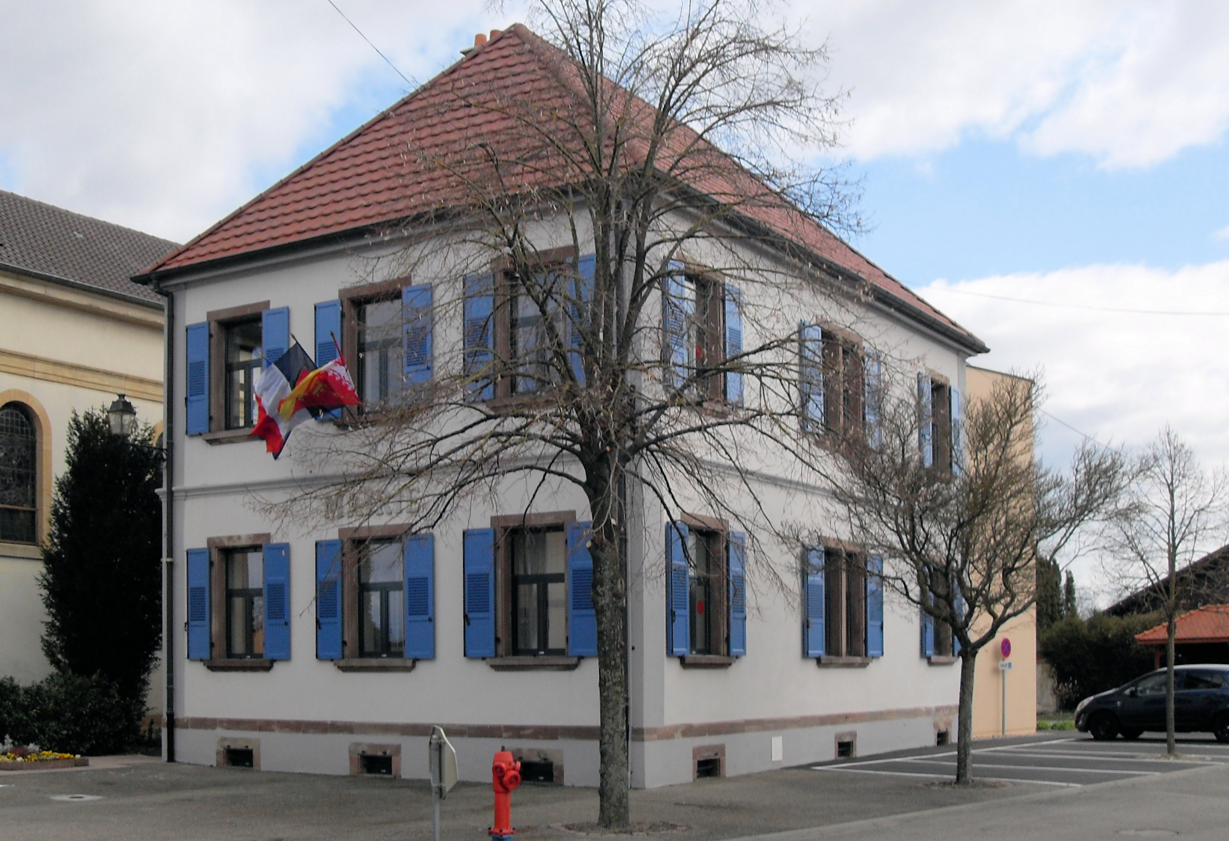 La mairie de Weckolsheim